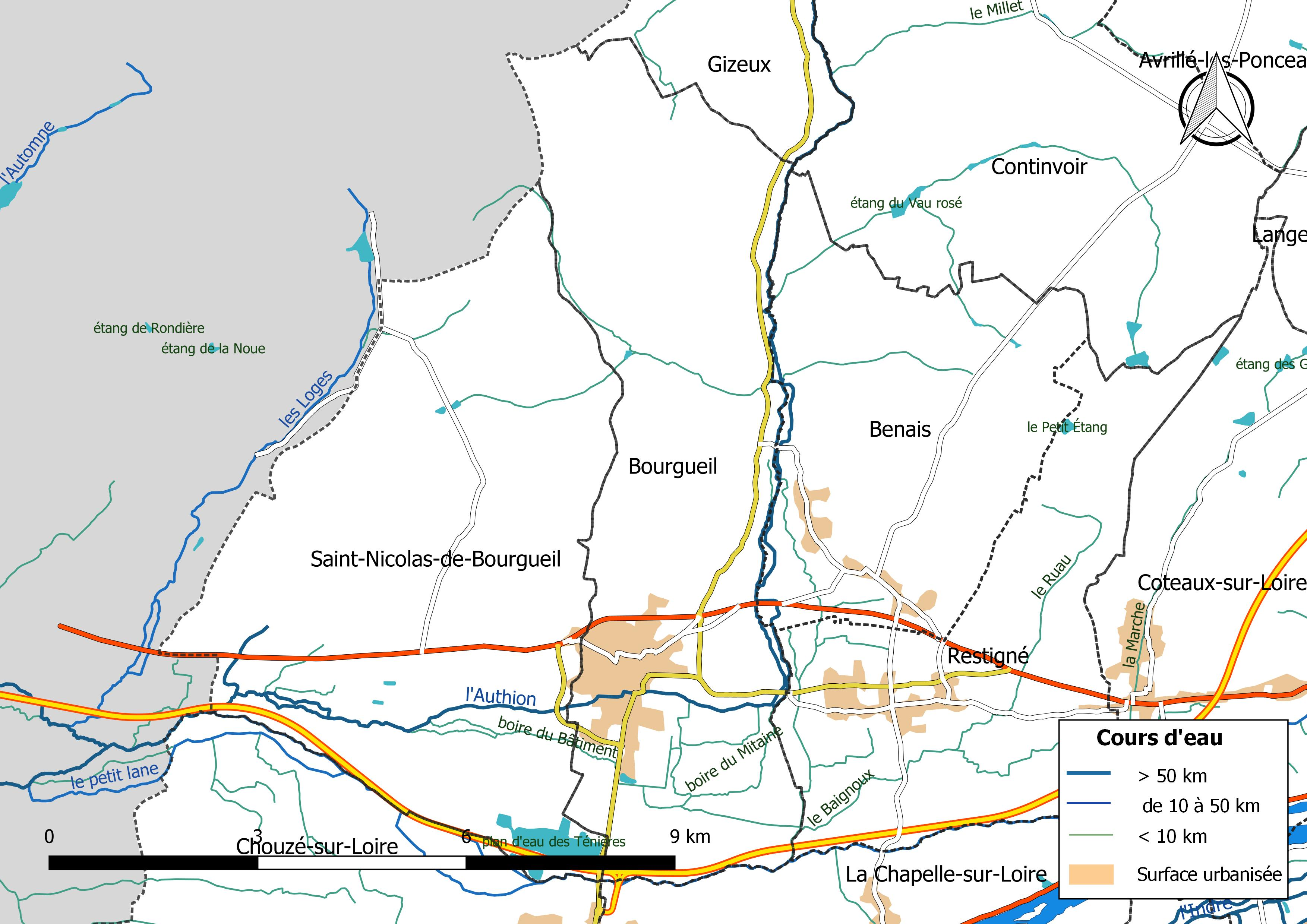 Carte du réseau hydrographique de la commune de Bourgueil (France).